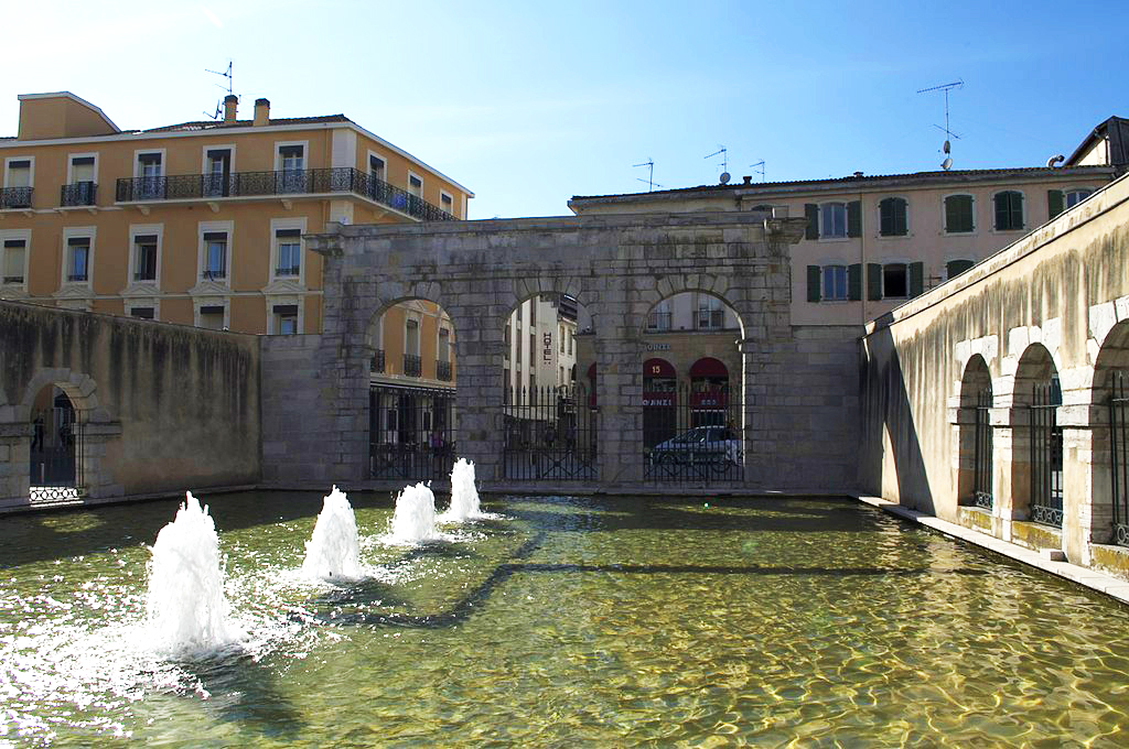 Photo de "Ad Vitam" retravaillé moins sombre, plus colorisée.